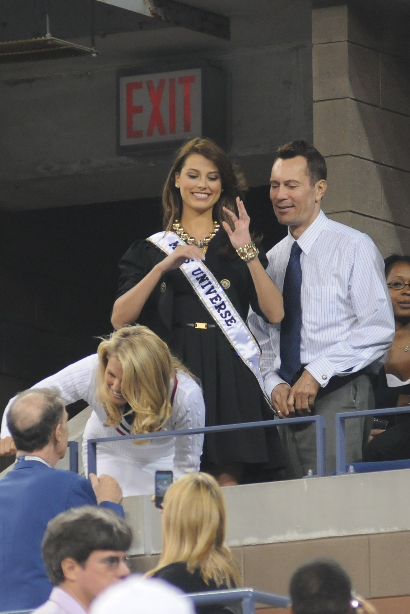 US Open 2009 141